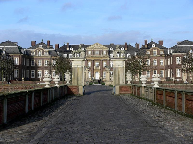 Innenhof Schloss Nordkirchen